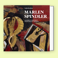 Marlen Spindler Band 3